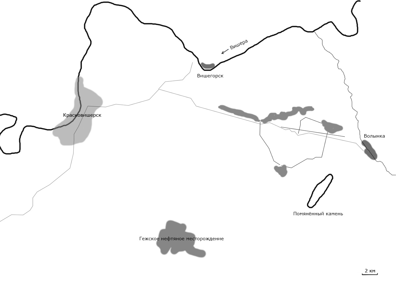 Расположение Помянённого камня